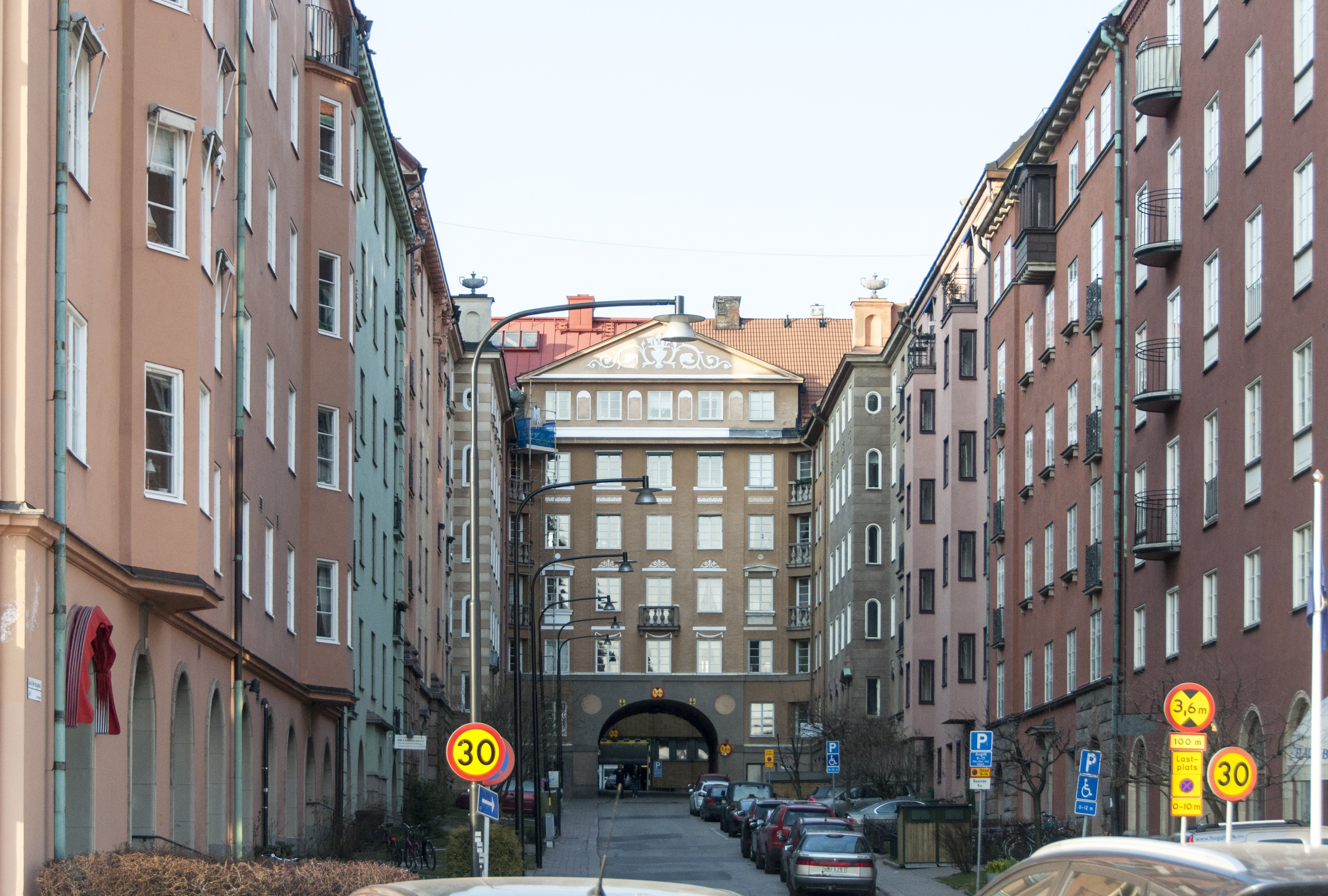 Jakob Westinsgatan, i fonden Vattuormen 22, Nybyggnadsår 1926 - 1928 Albin Broman (Byggherre) Arvid Cronvall (Arkitekt) Folke Hedman (Byggmästare) Joel Norborg (Arkitekt) Martin Bocander (Arkitekt)